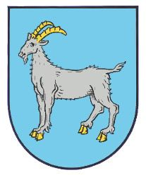 Wappen von Blaubach